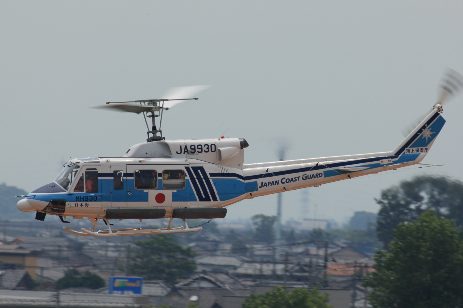 新潟空港で撮影された、海上保安庁第九管区海上保安本部のBell-212